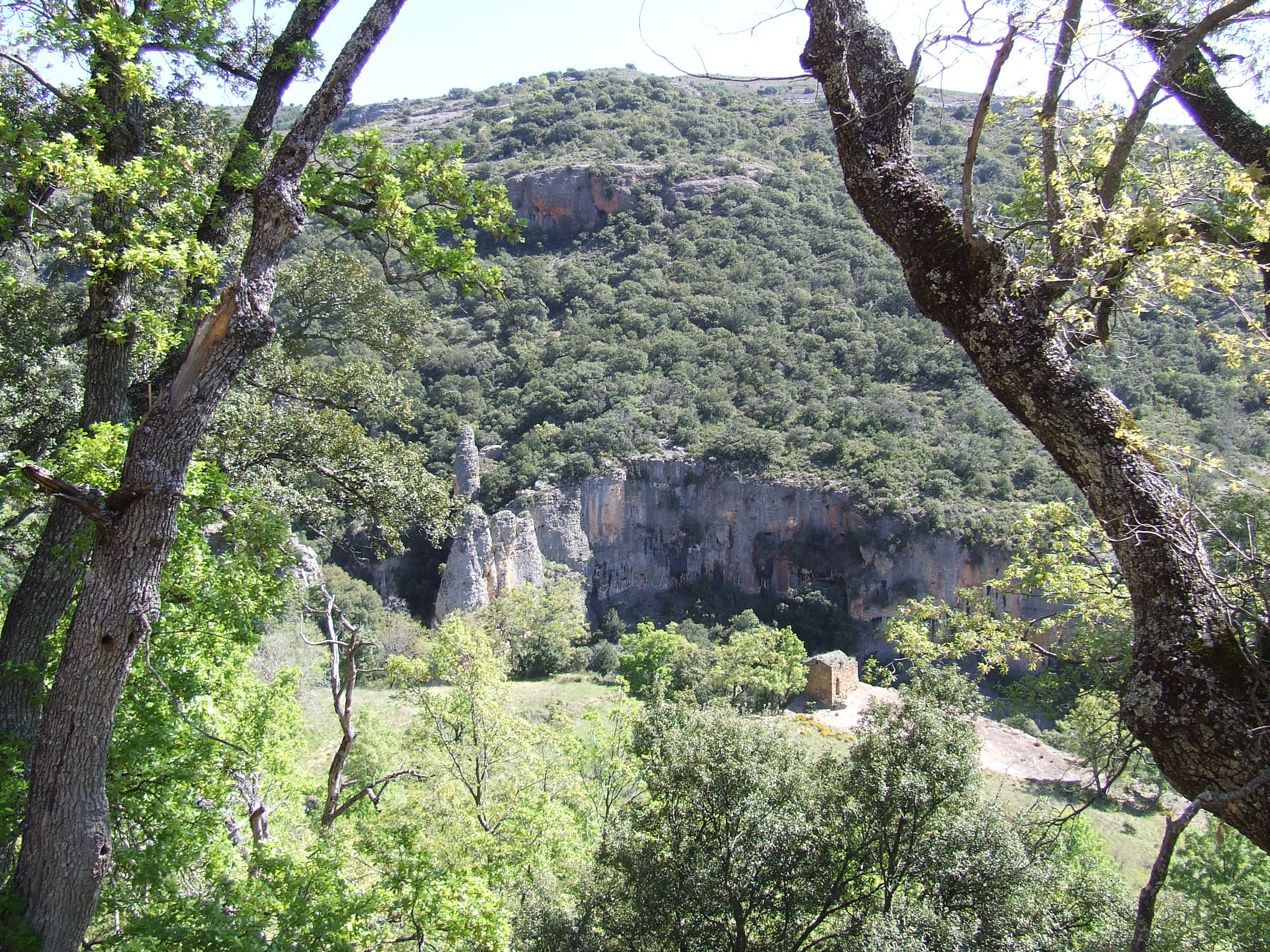 Sant Martí de Gurp en el seu marc (Gurp de la Conca, Tremp, Pallars Jussà)